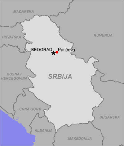 Sa srpske wikipedije. Ja sam prepravio sa njema?ke wiki.